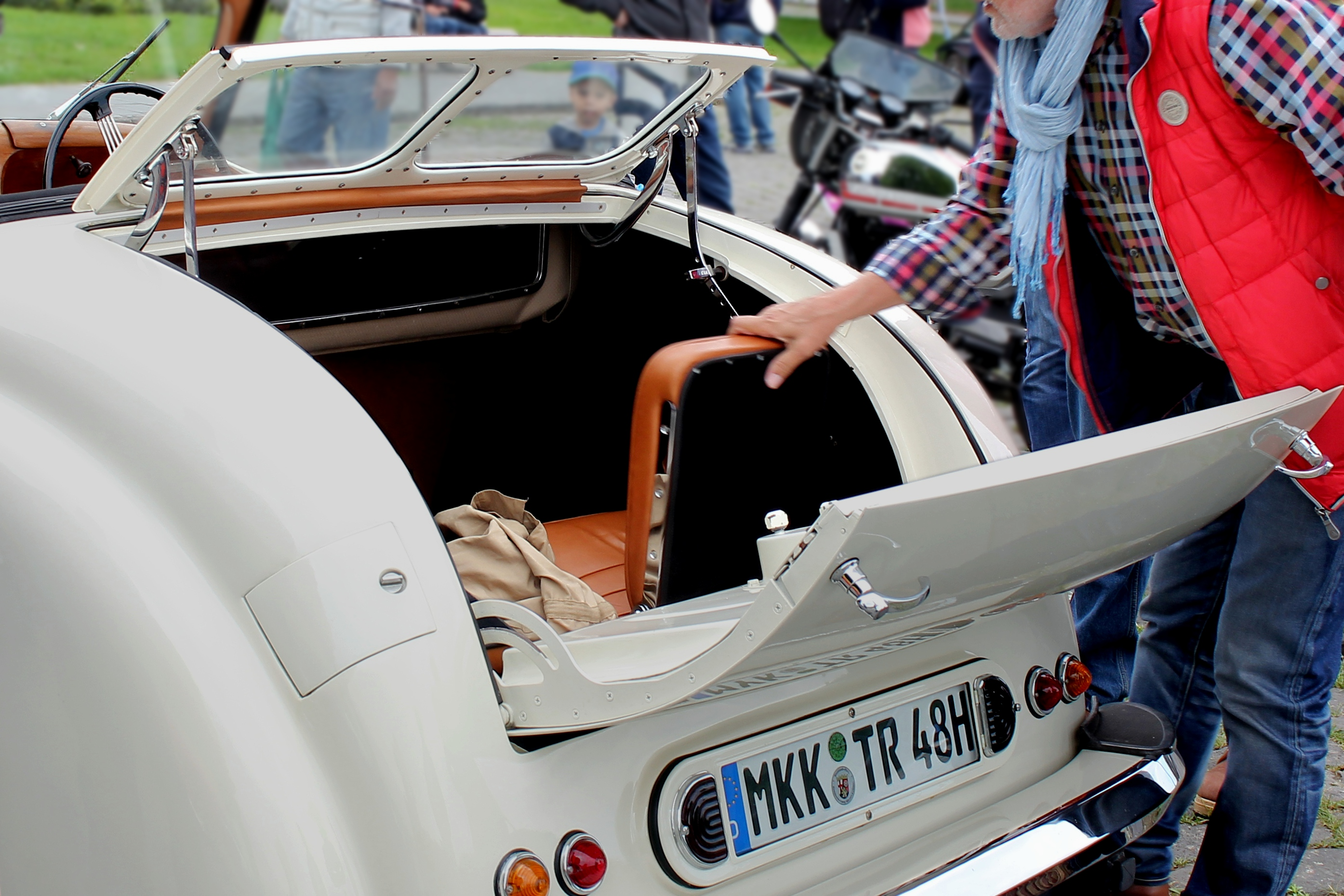 Triumph 1800 Roadster (fiktives Kennzeichen). Notsitz wird aufgeklappt.